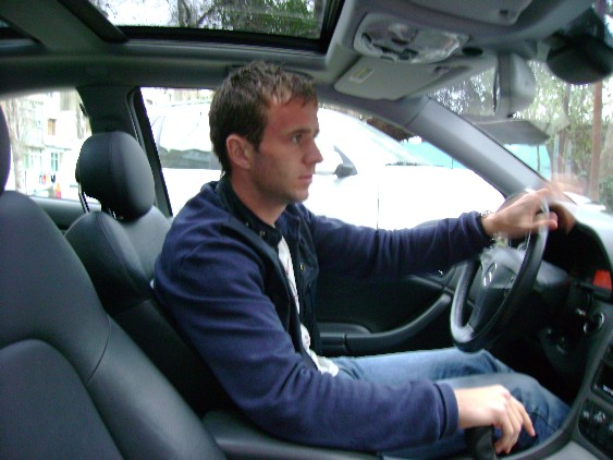 Branimir Subashich